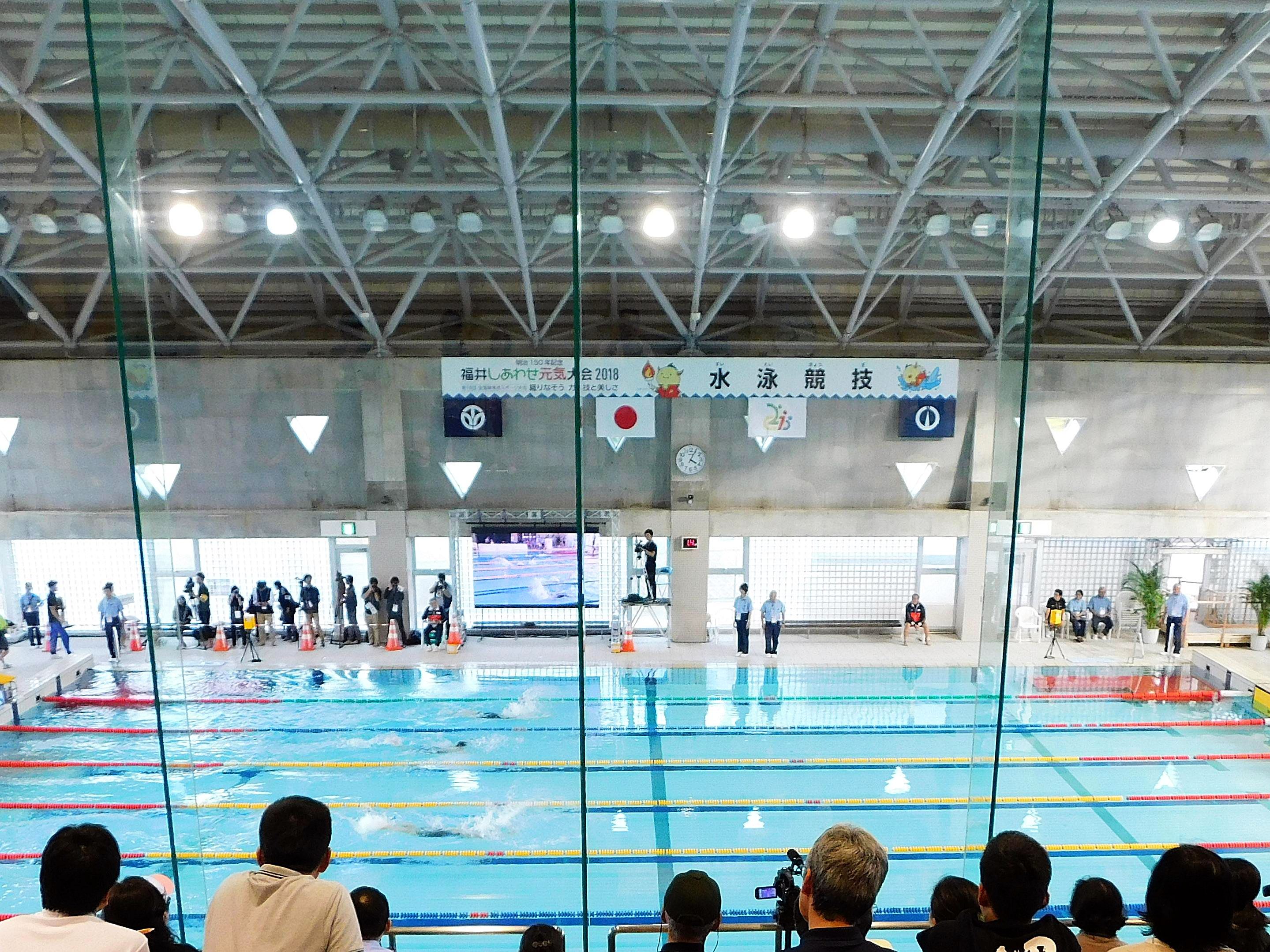 2018年の第18回全国障がい者スポーツ大会、福井県敦賀市総合運動公園プールで行われた水泳競技